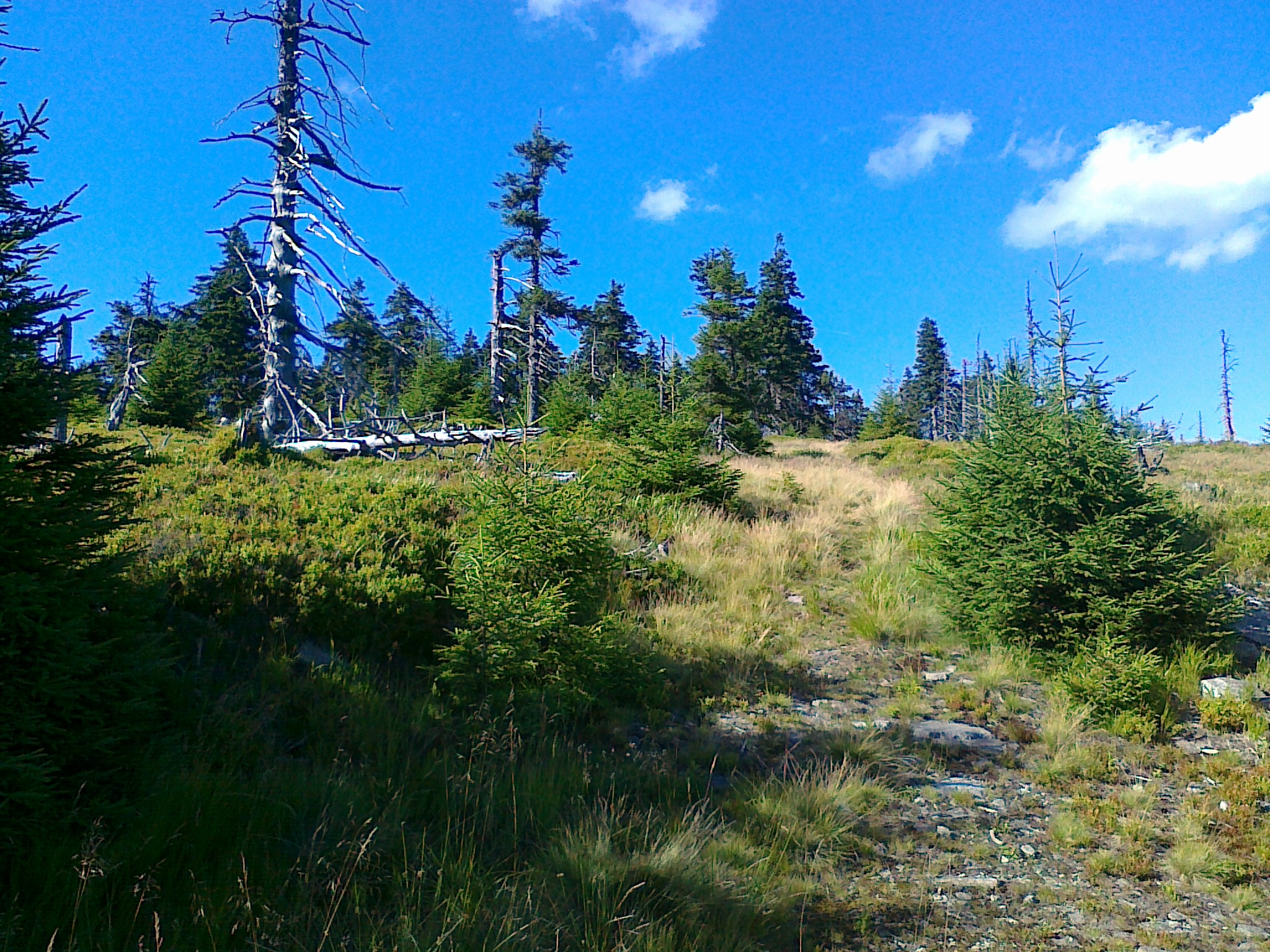 Widok na szczyt góry Spálený vrch - 1313 m n.p.m.